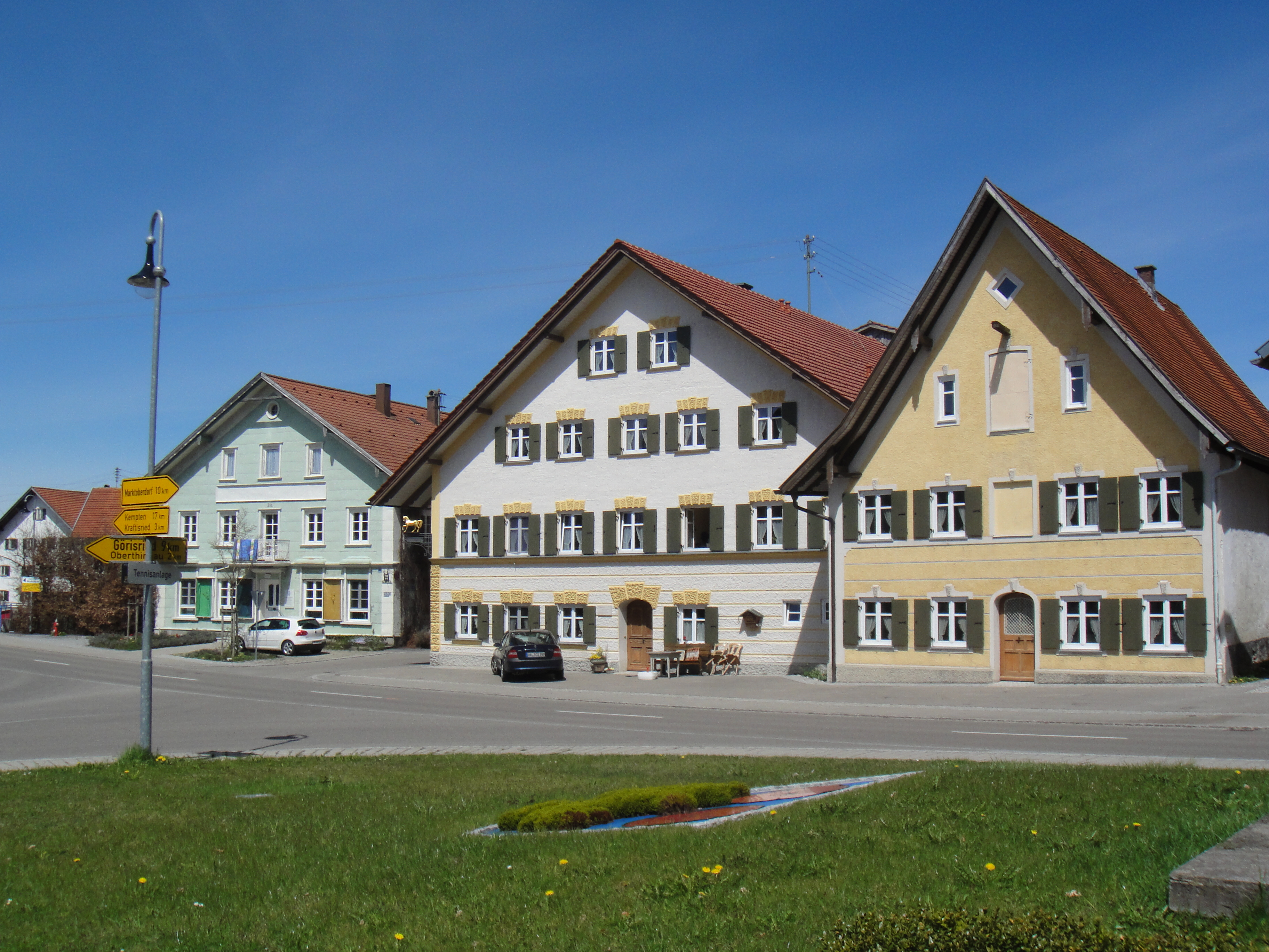 Gasthof Rössl und weitere Häuser im Zentrum von Unterthingau